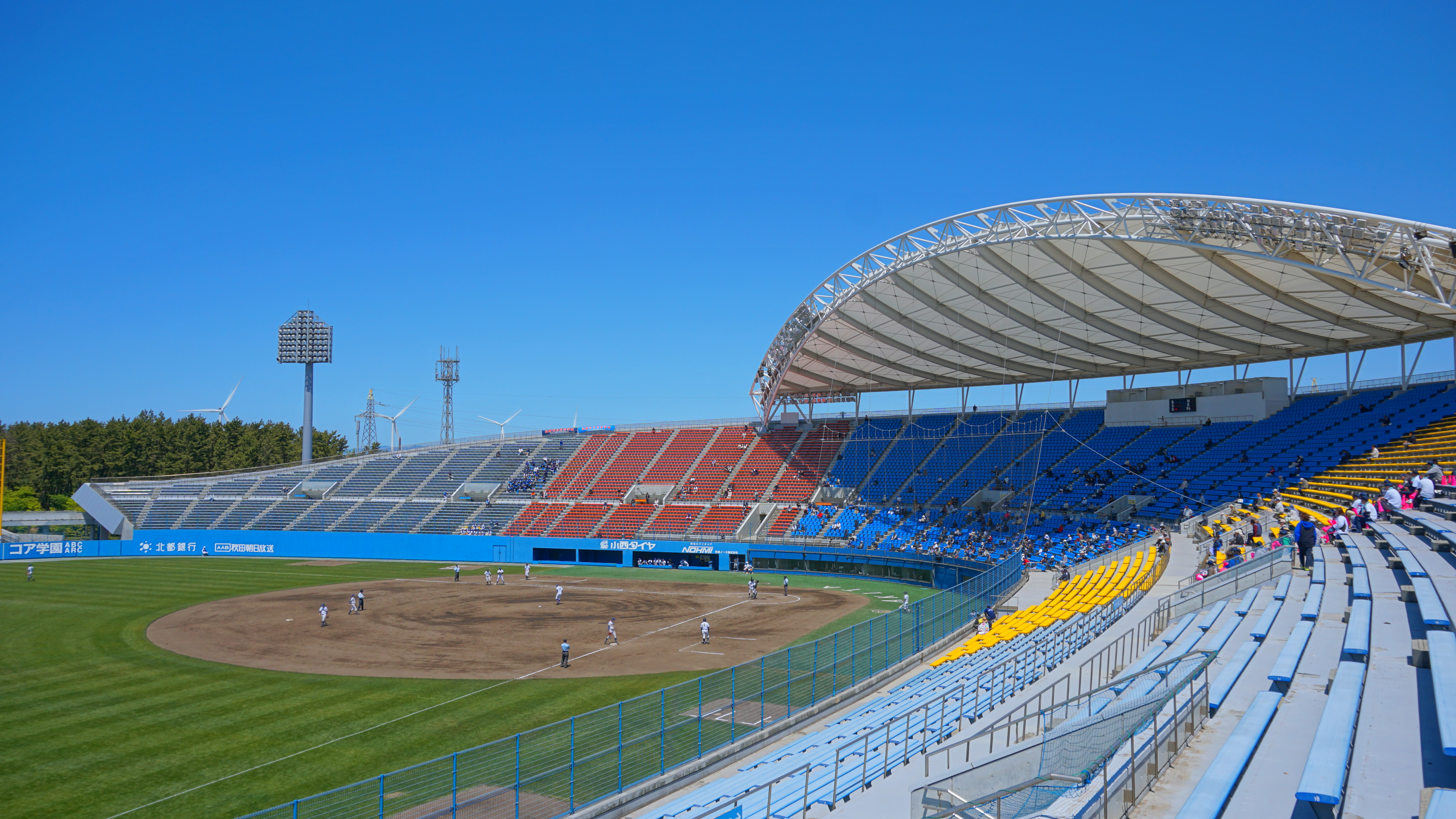 秋田県立野球場（秋田こまちスタジアム）